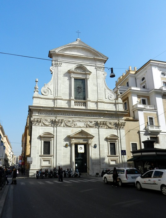 Roma - Chiesa di S. Maria in Via (Santuario della Madonna del Pozzo)